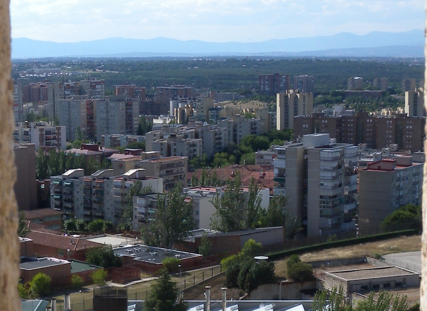 Hospital Central de la Defensa Gomez Ulla